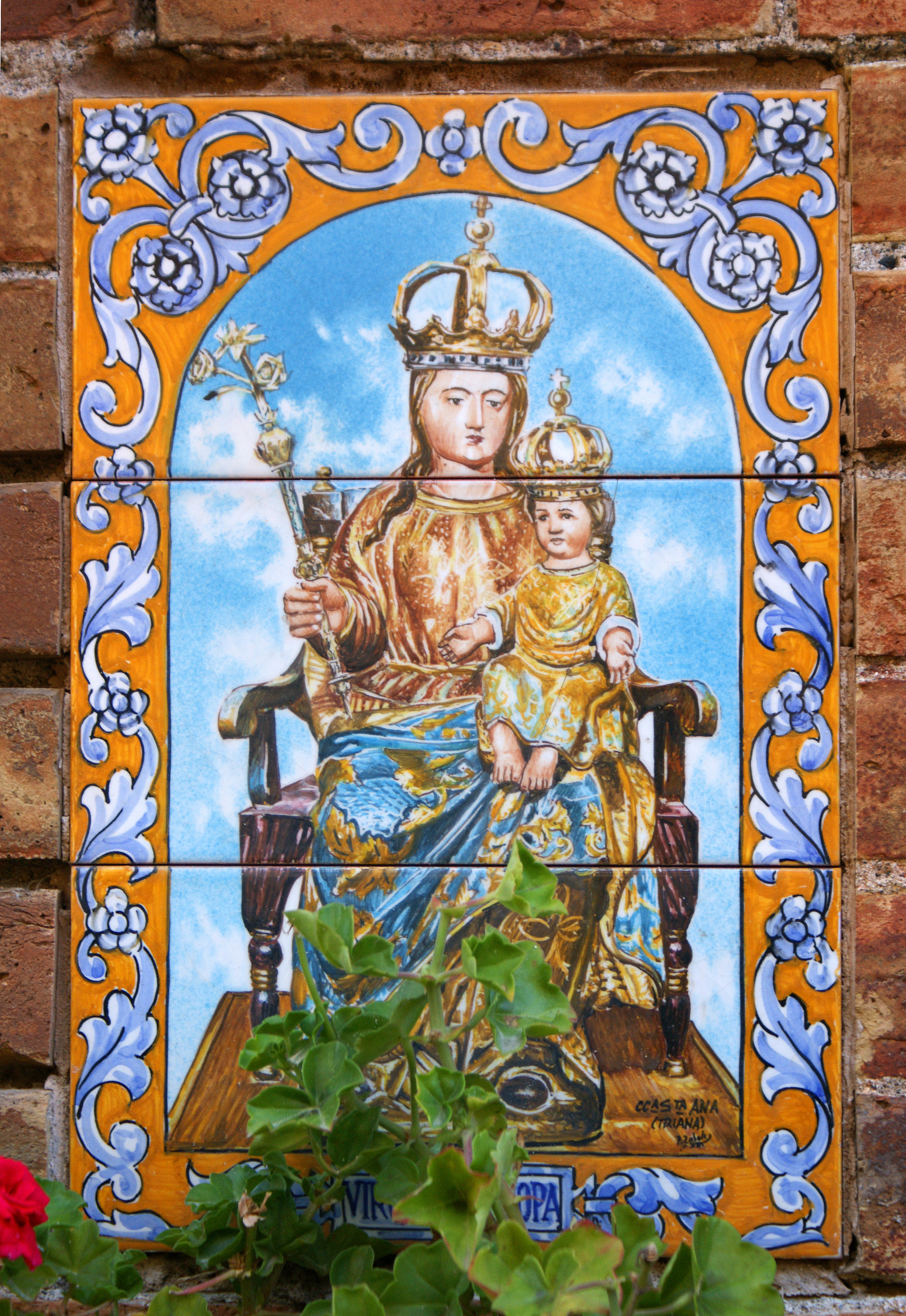 Gibraltar plaques - Our Lady of Europa